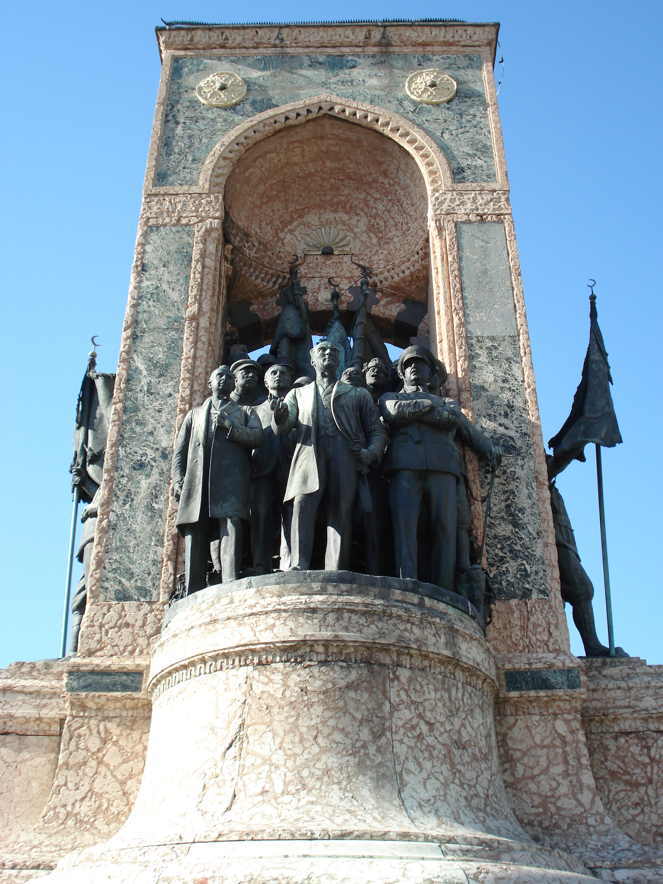 Taksim Meydanı in İstanbul